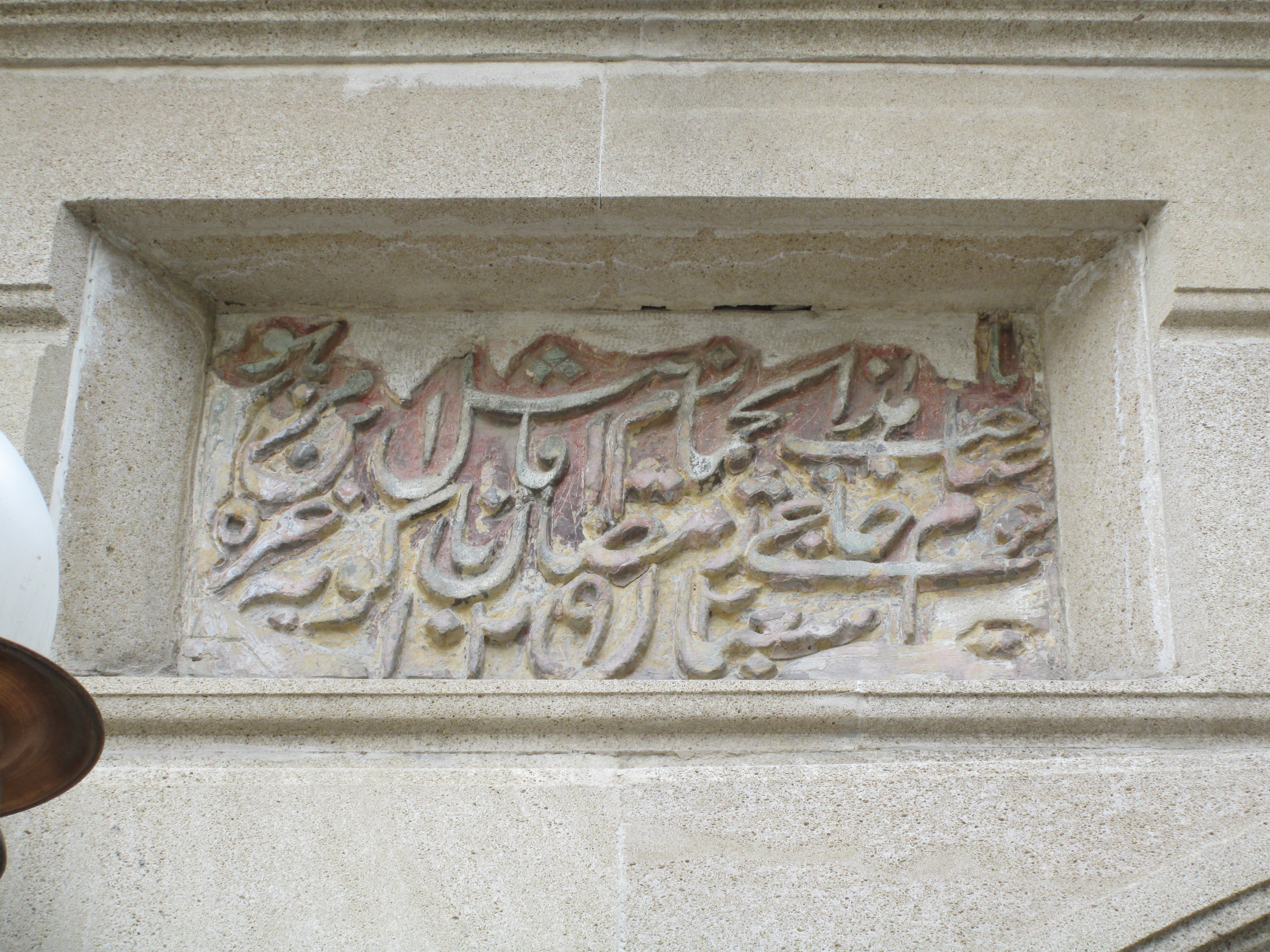 Ağa Zeynal hamamının daş kitabəsi